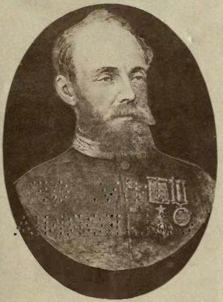 Portrait of Sir Pierre Louis Napoleon Cavagnari (1841-1879)